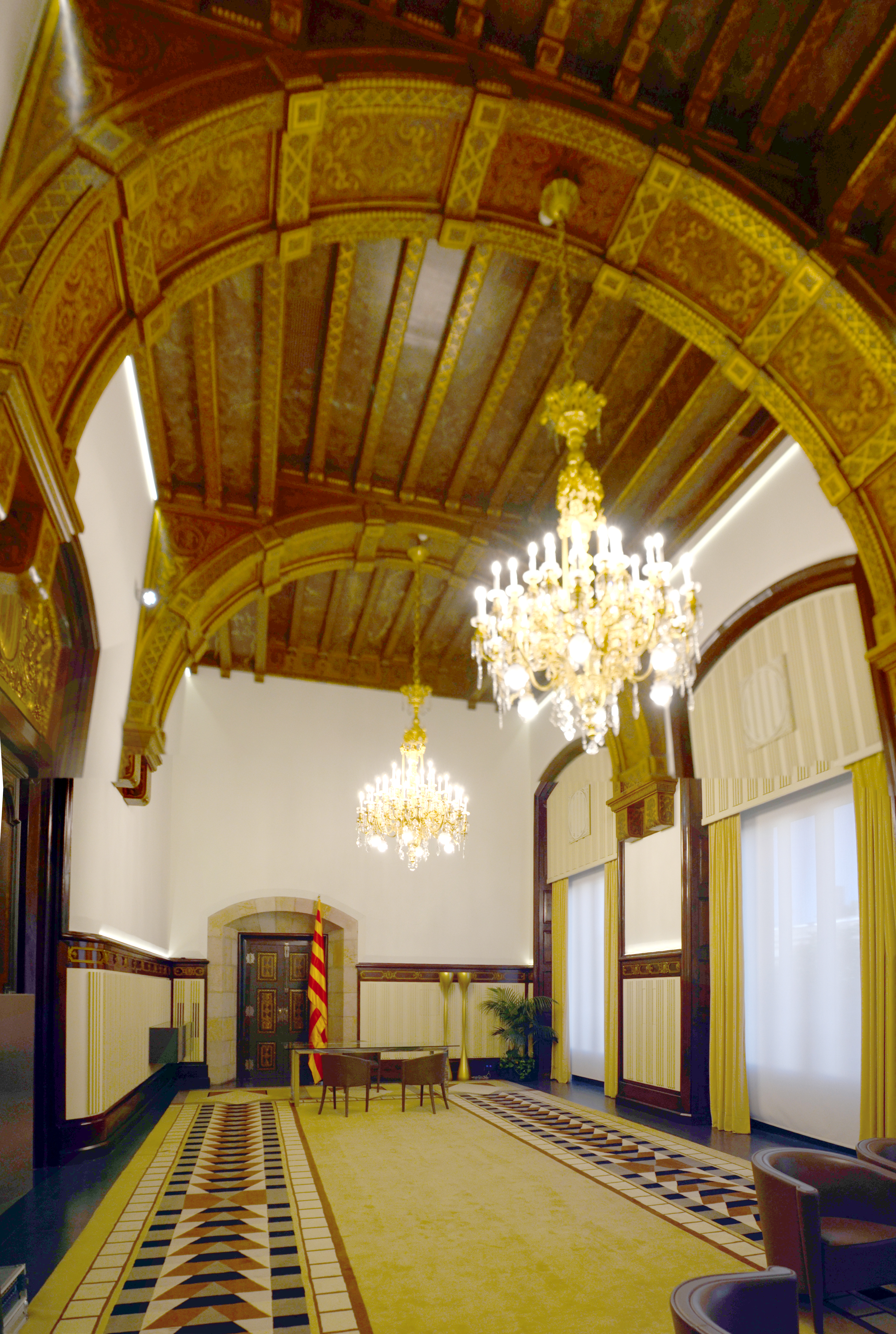 Despacho de la presidencia